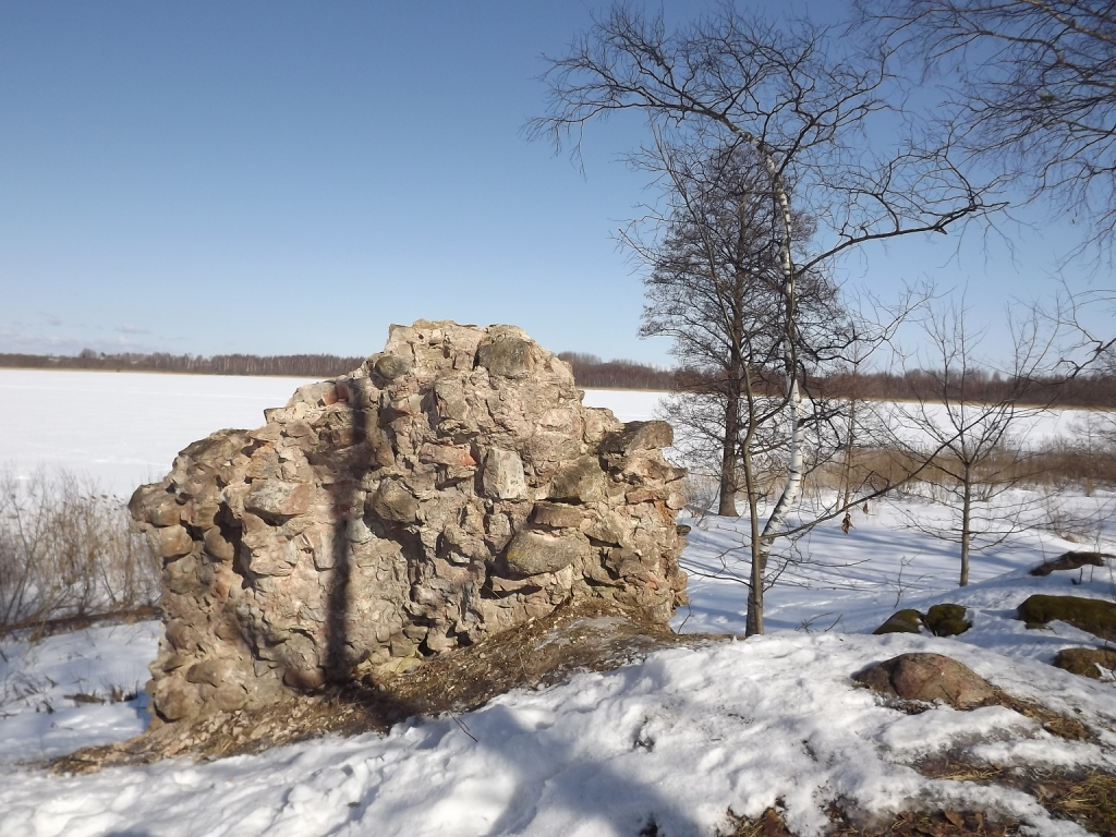 Viļakas (Marienhauzenas) viduslaiku pils drupu fragments